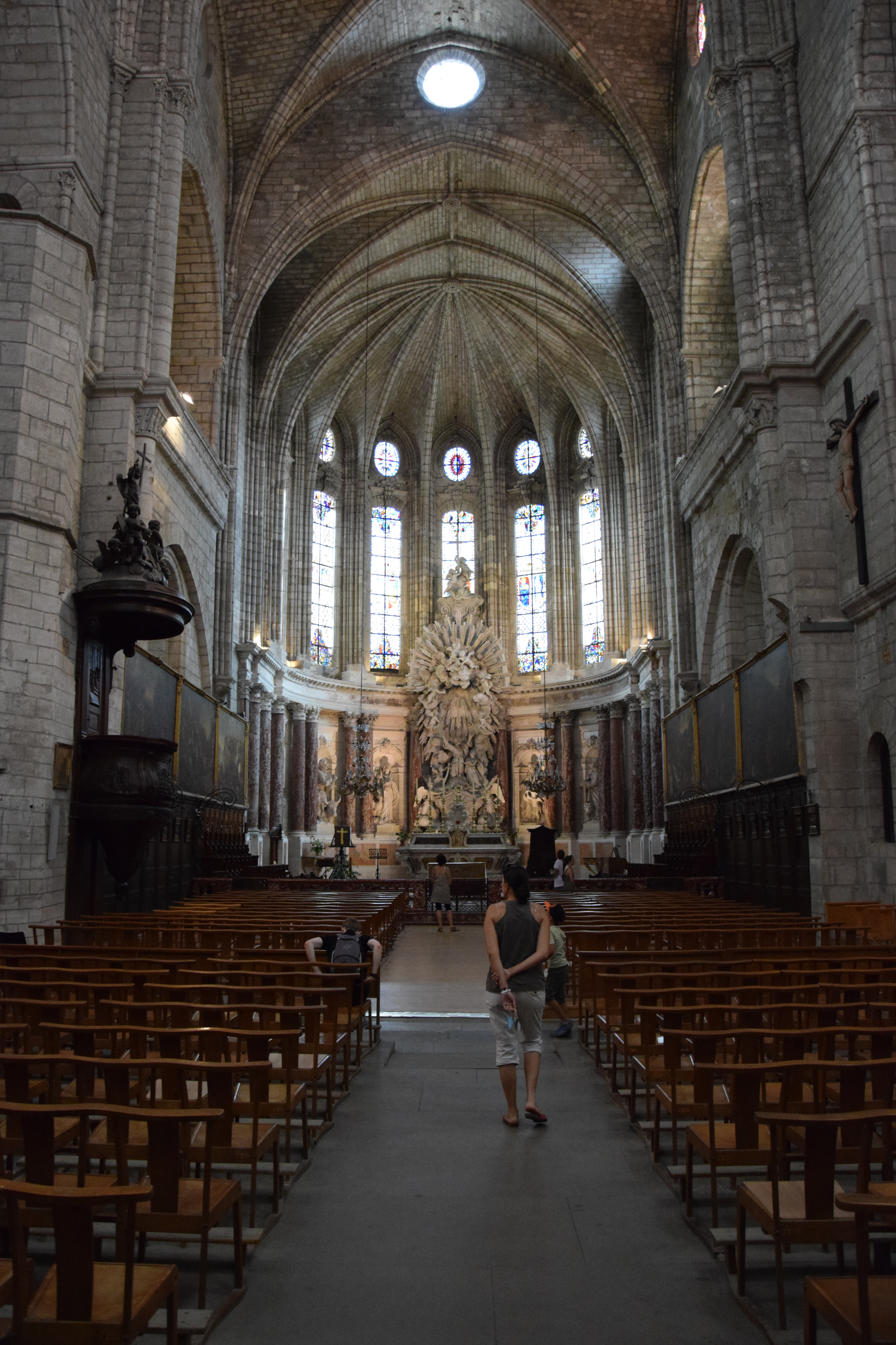 Cathédrale Saint-Nazaire .